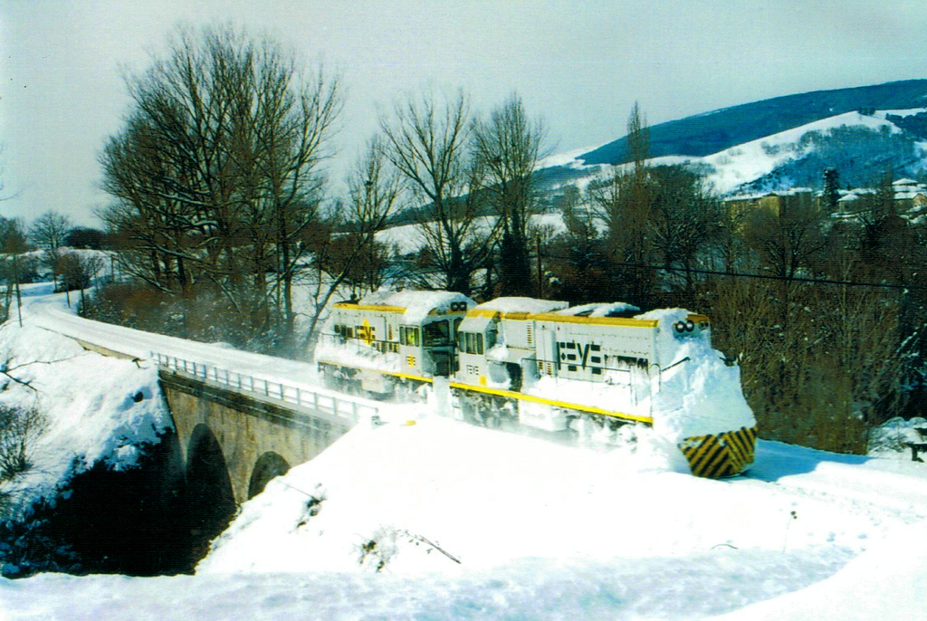 Pareja de locomotoras General Electric limpiando la via de nieve en el puente sobre el río Trueba en Espinosa de los monteros (2 - 4 - 2004)